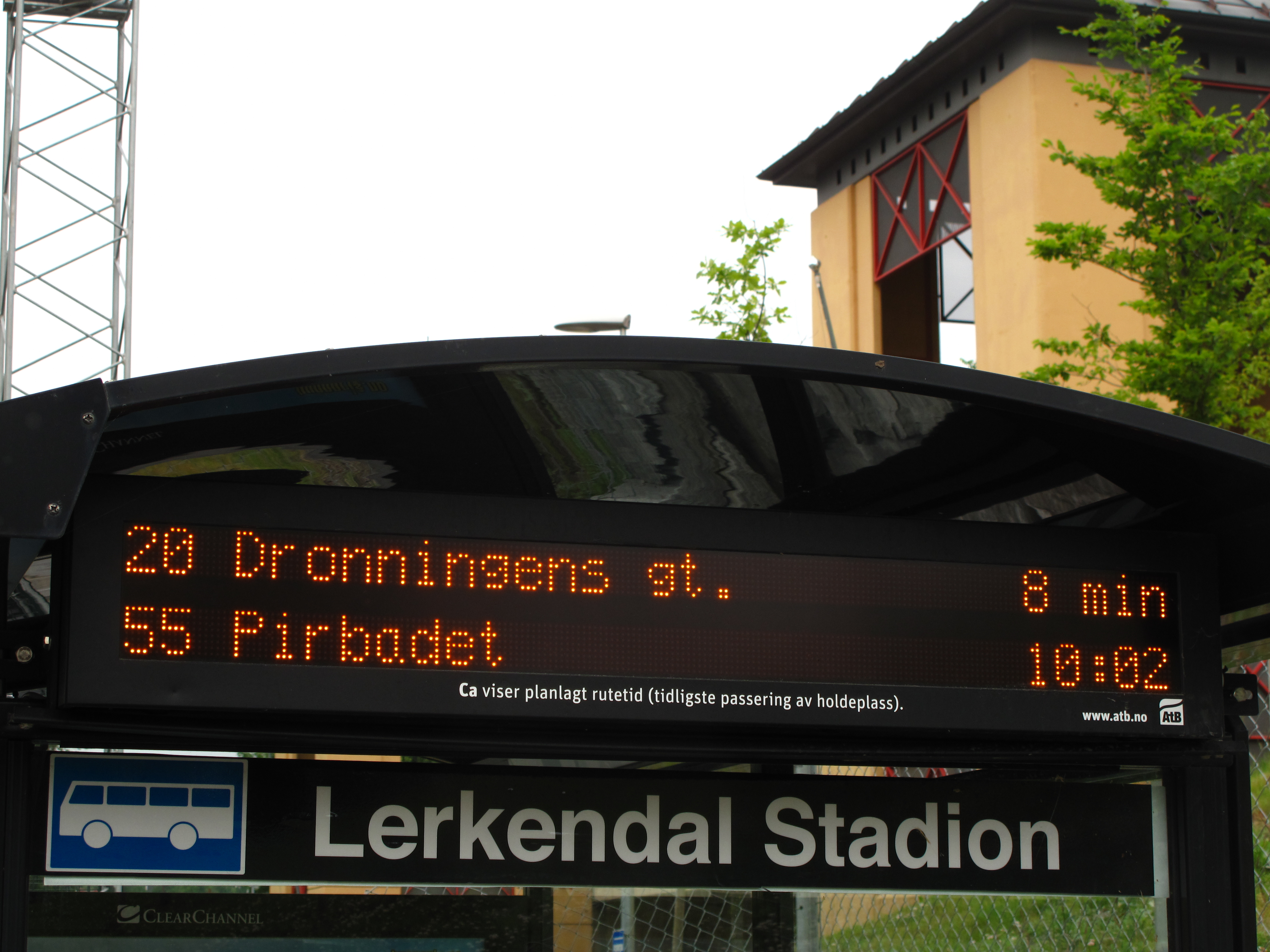 Sanntidsinformasjon for AtBs busser på holdeplassen ved Lerkendal stadion i 2012.